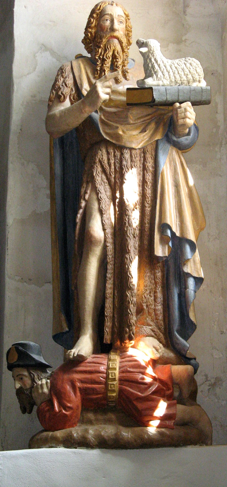 Plastik Johannes des Täufers in St. Johannis in Nieblum